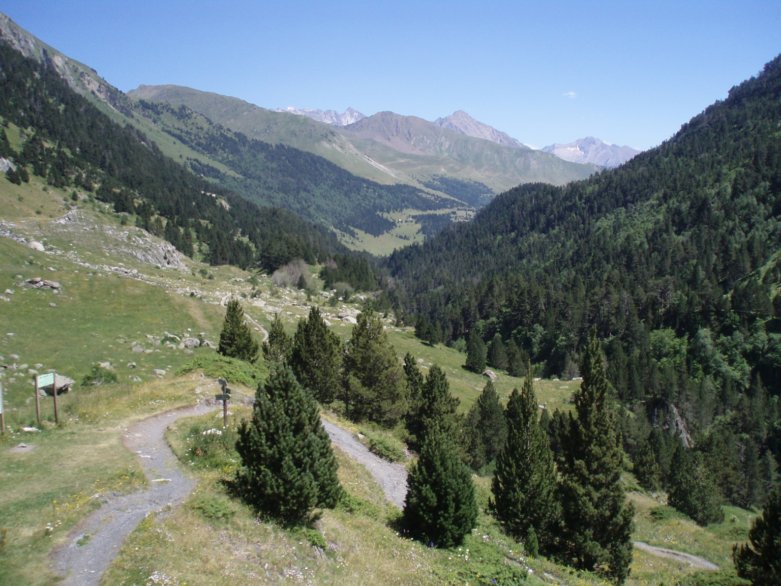 Valle de Estós (Pirineos, España).